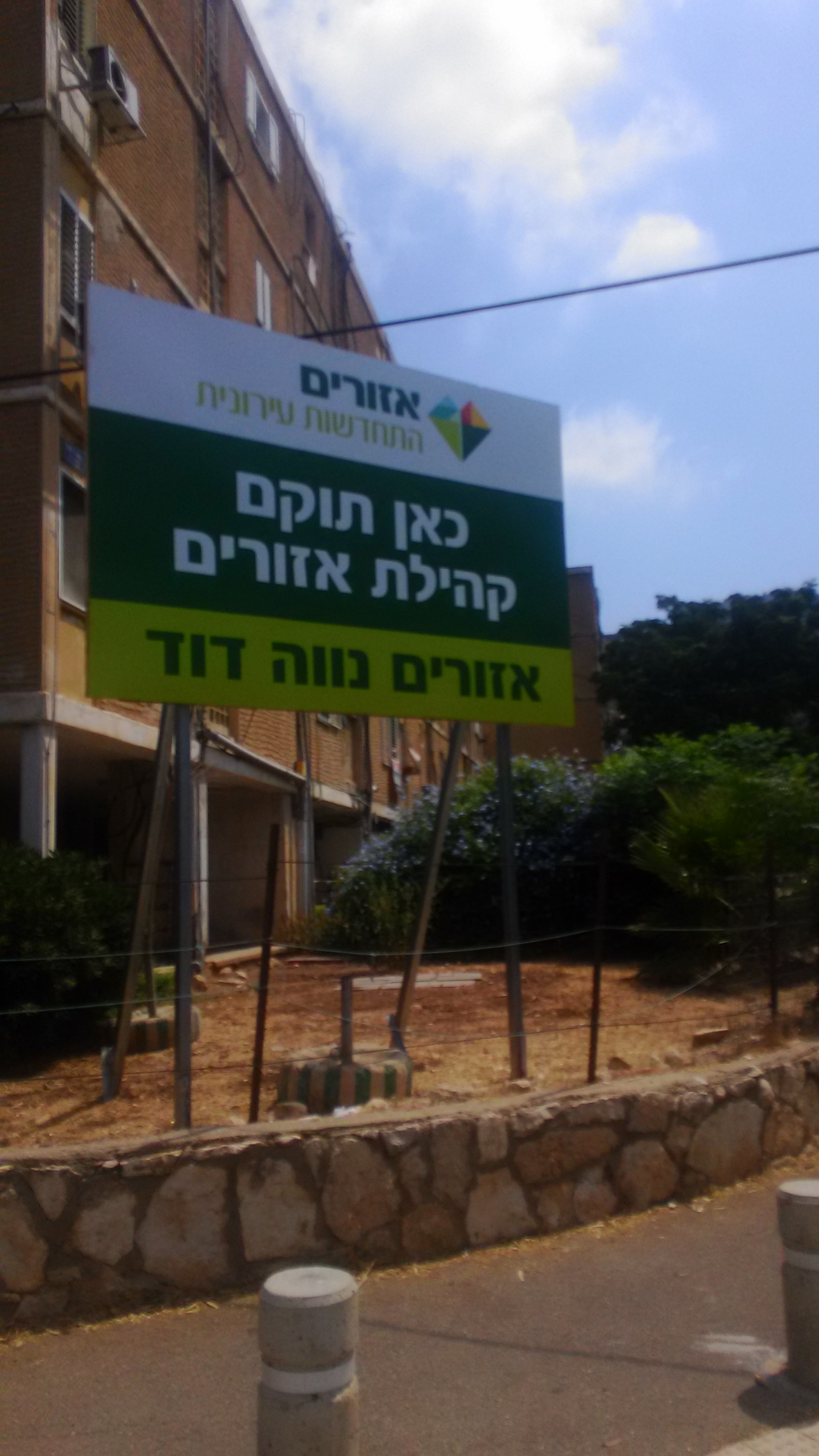 פרויקט התחדשות עירונית של חברת אזורים